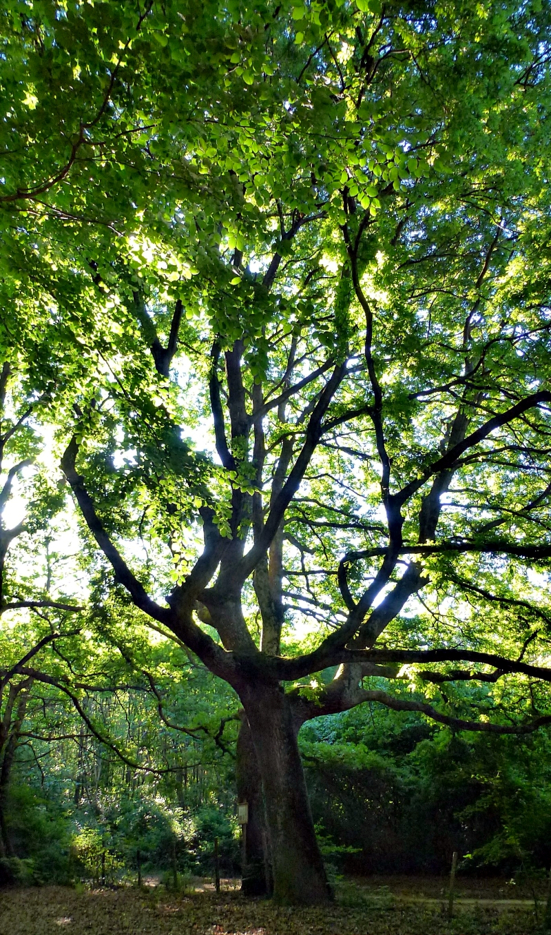 Il "Cerrone", grande cerro ai margini della faggeta vetusta depressa di Monte Raschio